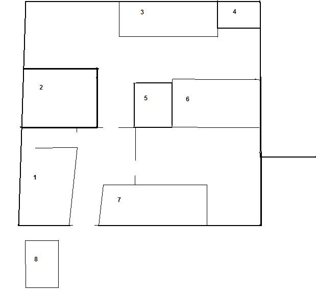 La pianta del castello di Maniago per come si presentano tutt'oggi i ruderi.